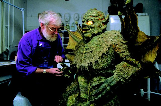 Der_Drache_Daniel